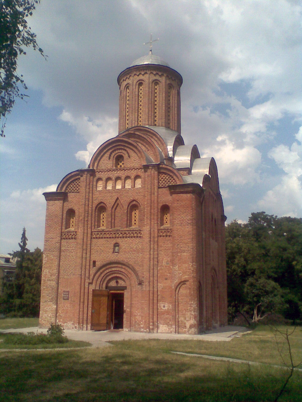 Пятницкая церковь в Чернигове